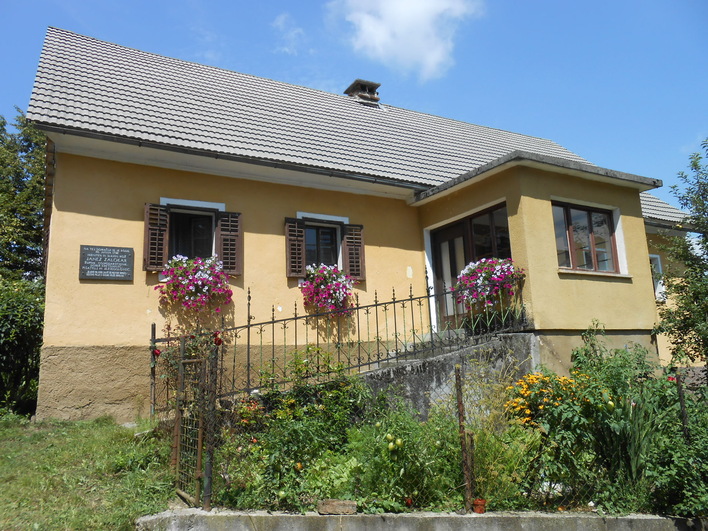 Rojstna hiša Janeza Zalokarja, Vinica pri Šmarjeti